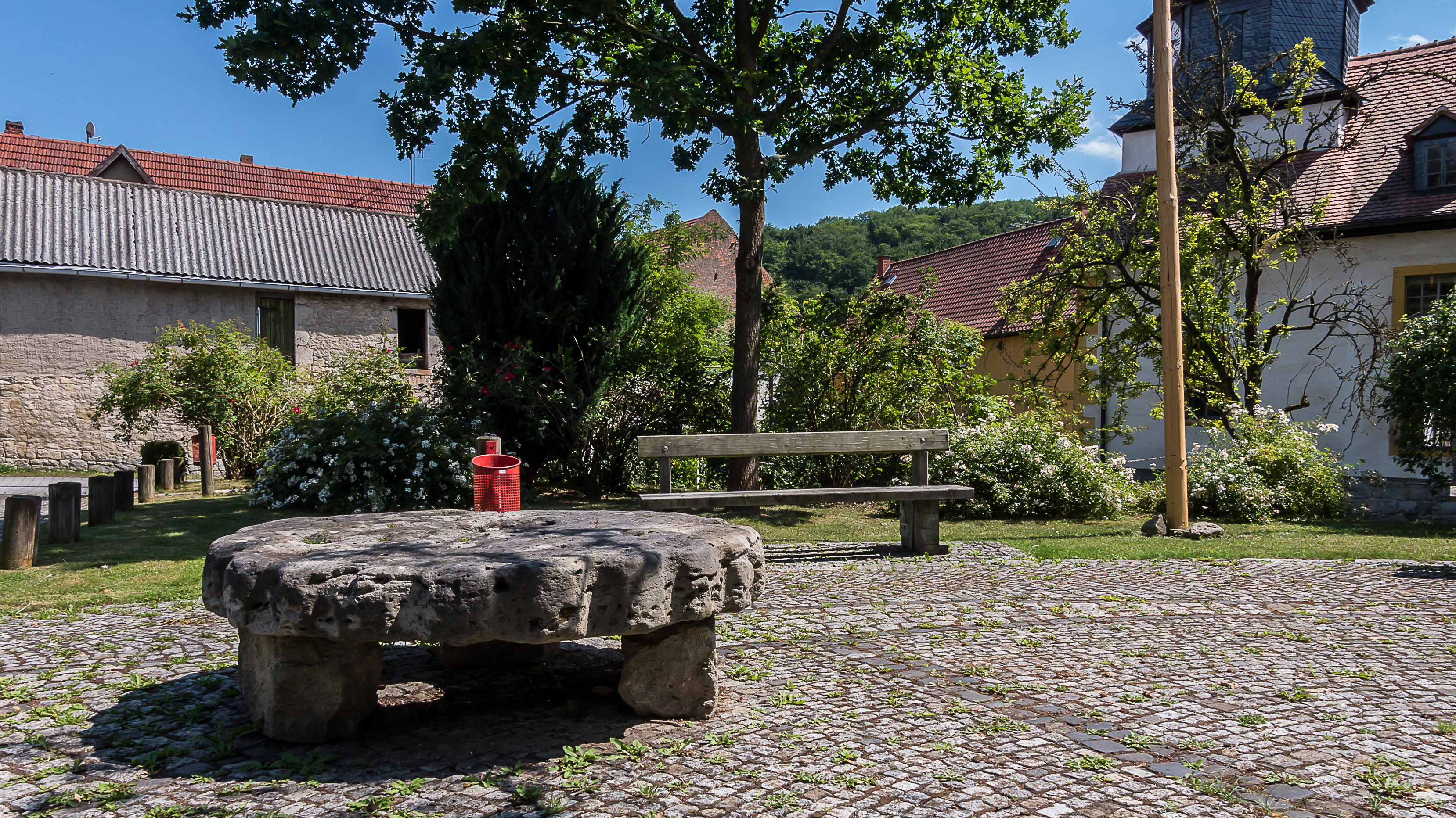 Oettern Grünfläche zwischen Nr. 1 und Brücke Waidmühlstein